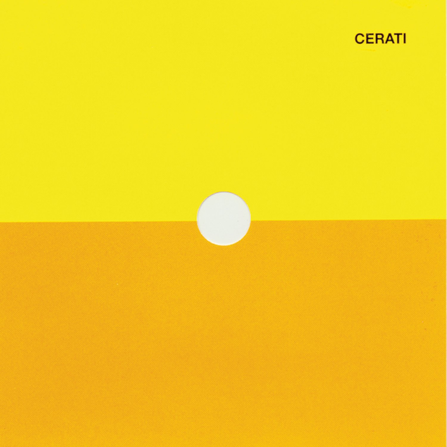 Cover del disco 'Amor Amarillo' de Gustavo Cerati.